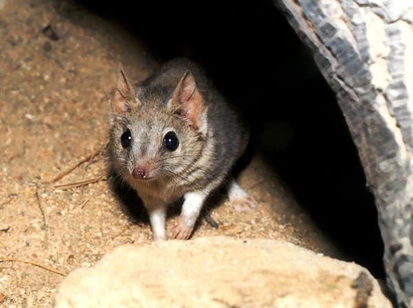 Dasyuroides byrnei Vakorejsek čtyřprstý